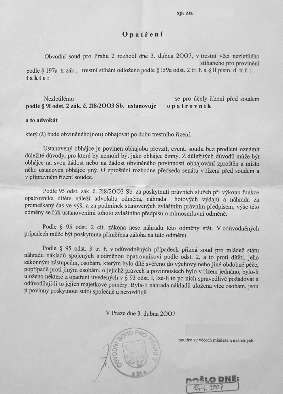 Opatření, kterým se ustanovuje opatrovník pro účely řízení před soudem (dle § 91/2 zák. č. 218/2003 Sb.)